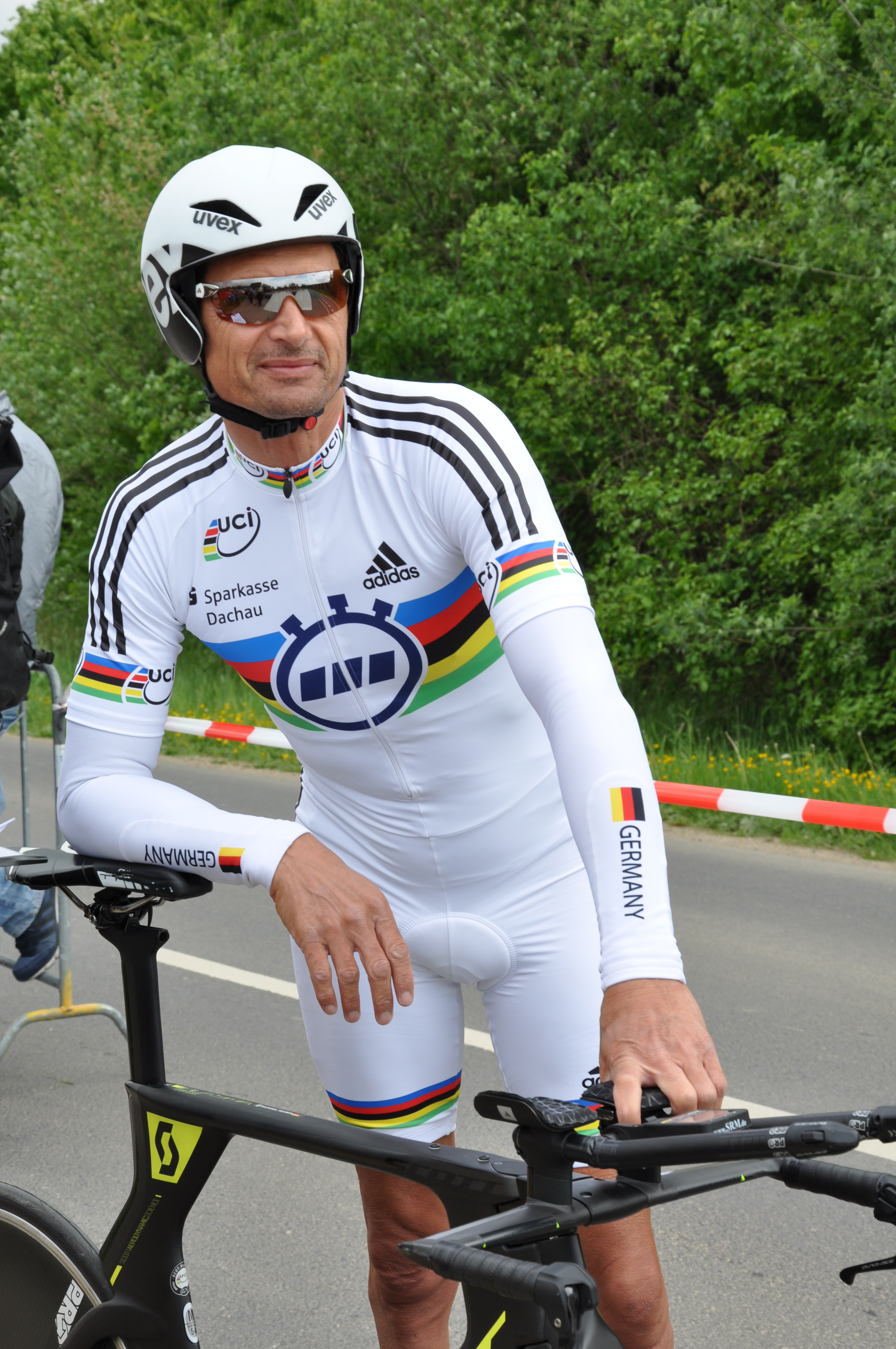 Michael Teuber, German para-cyclist